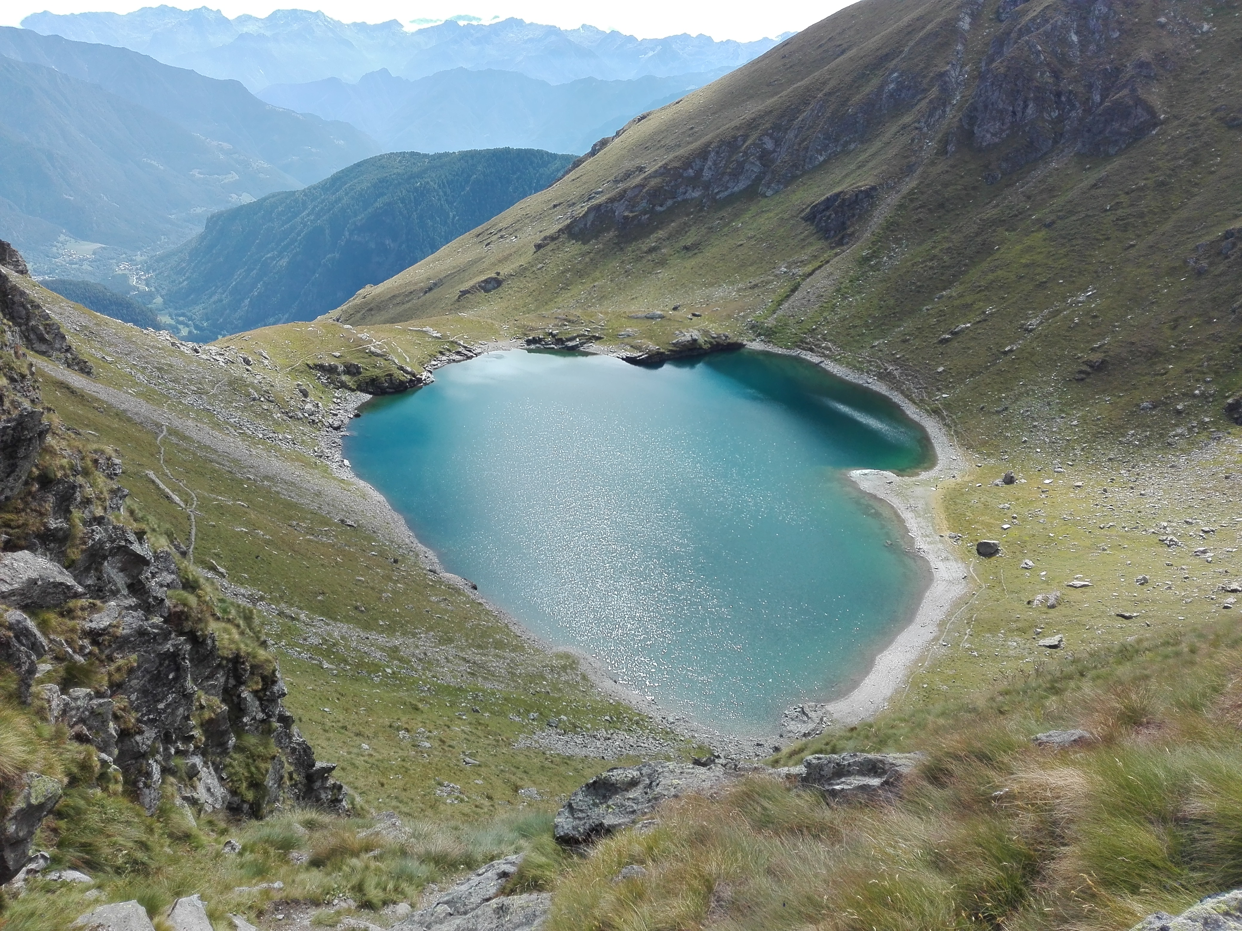 Il lago di Bringuez nel vallone di Bringuez nel comune di Brusson in Valle d'Aosta